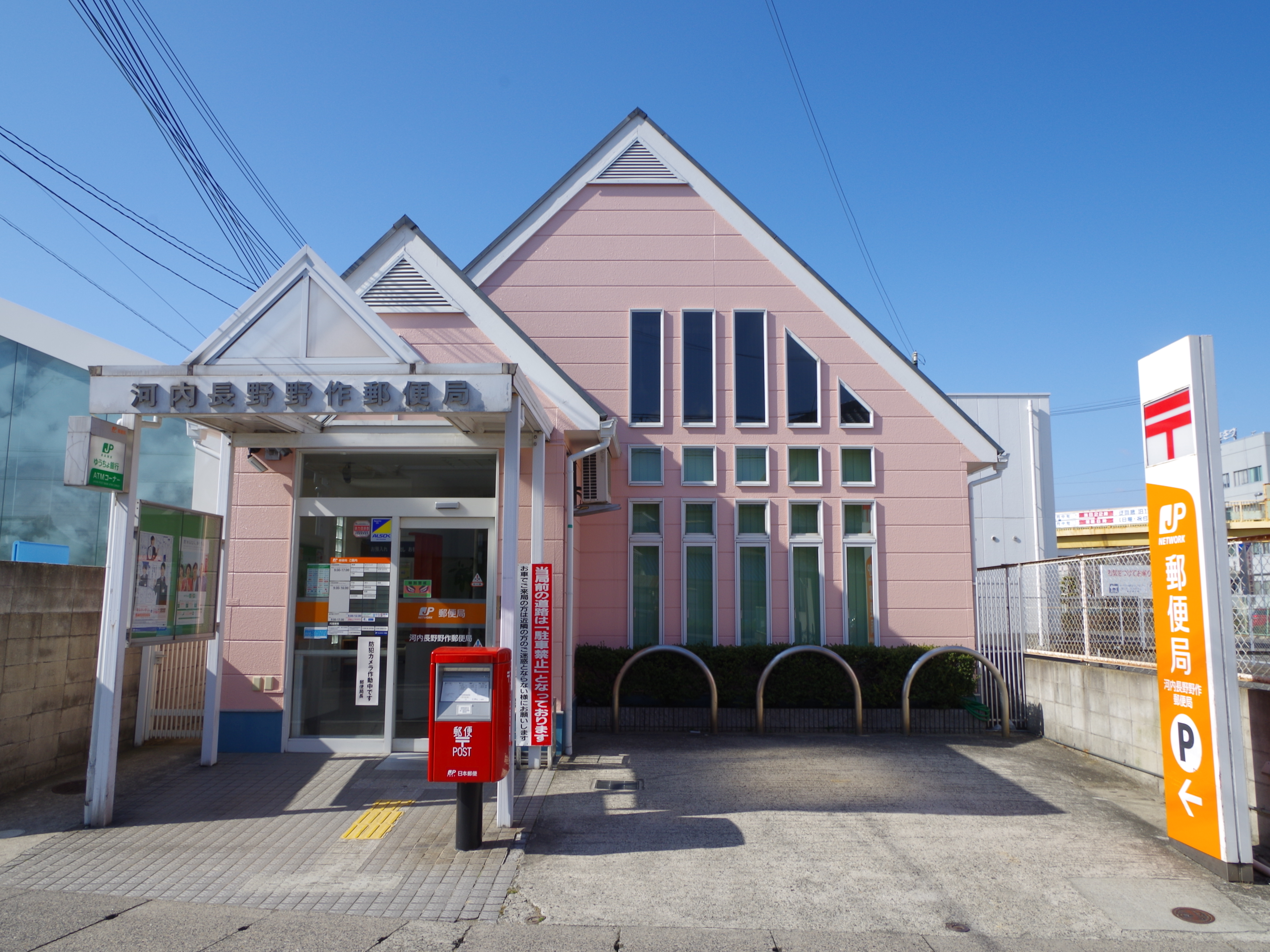 河内長野野作郵便局 Kawachinagano-Nosaku Post Office 2013.2.10